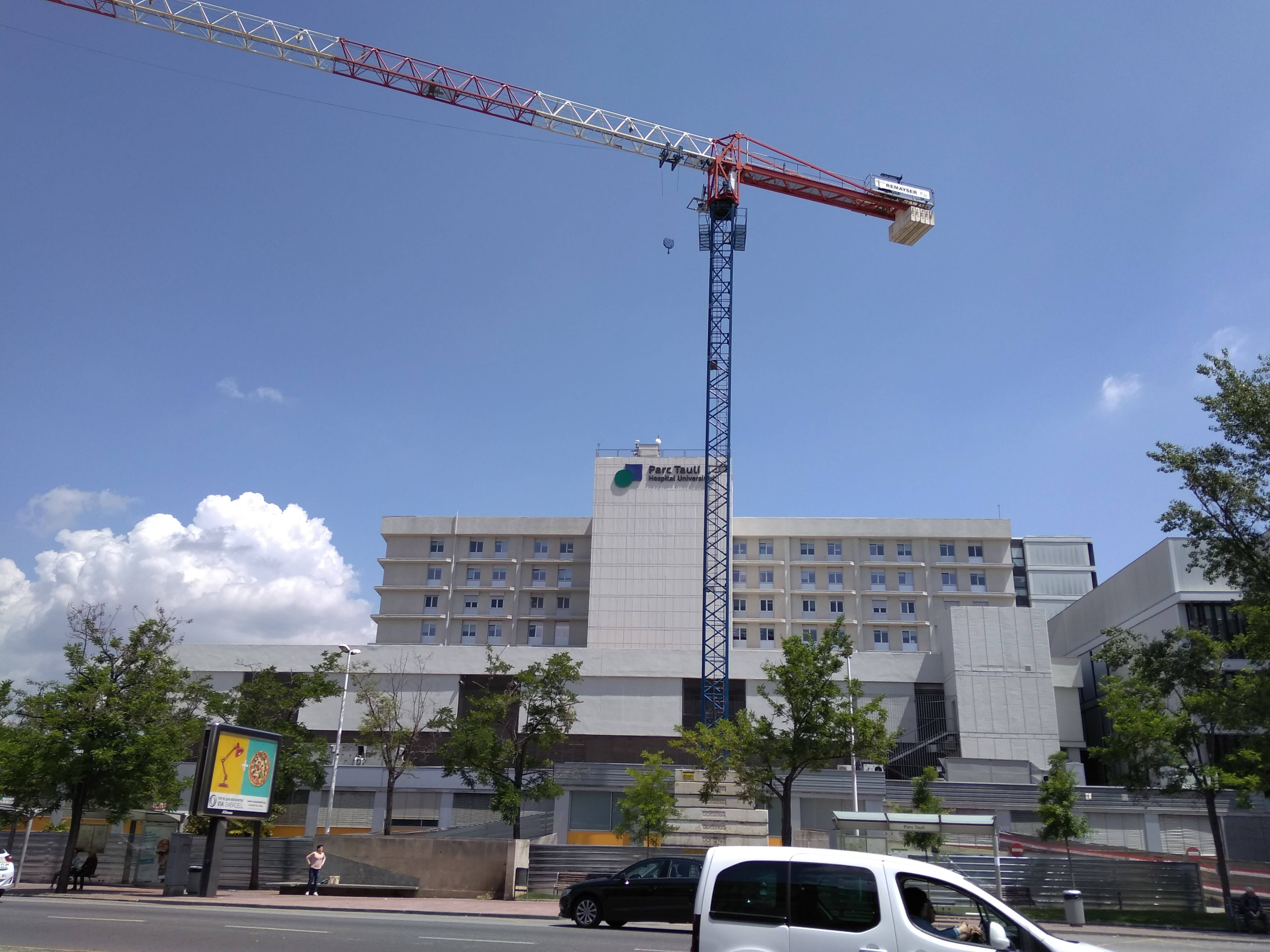 Inici obres ampliació urgències taulí juny 2018